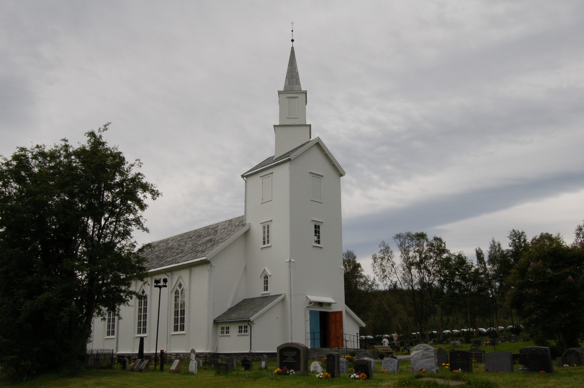 Talvik kirke (church)